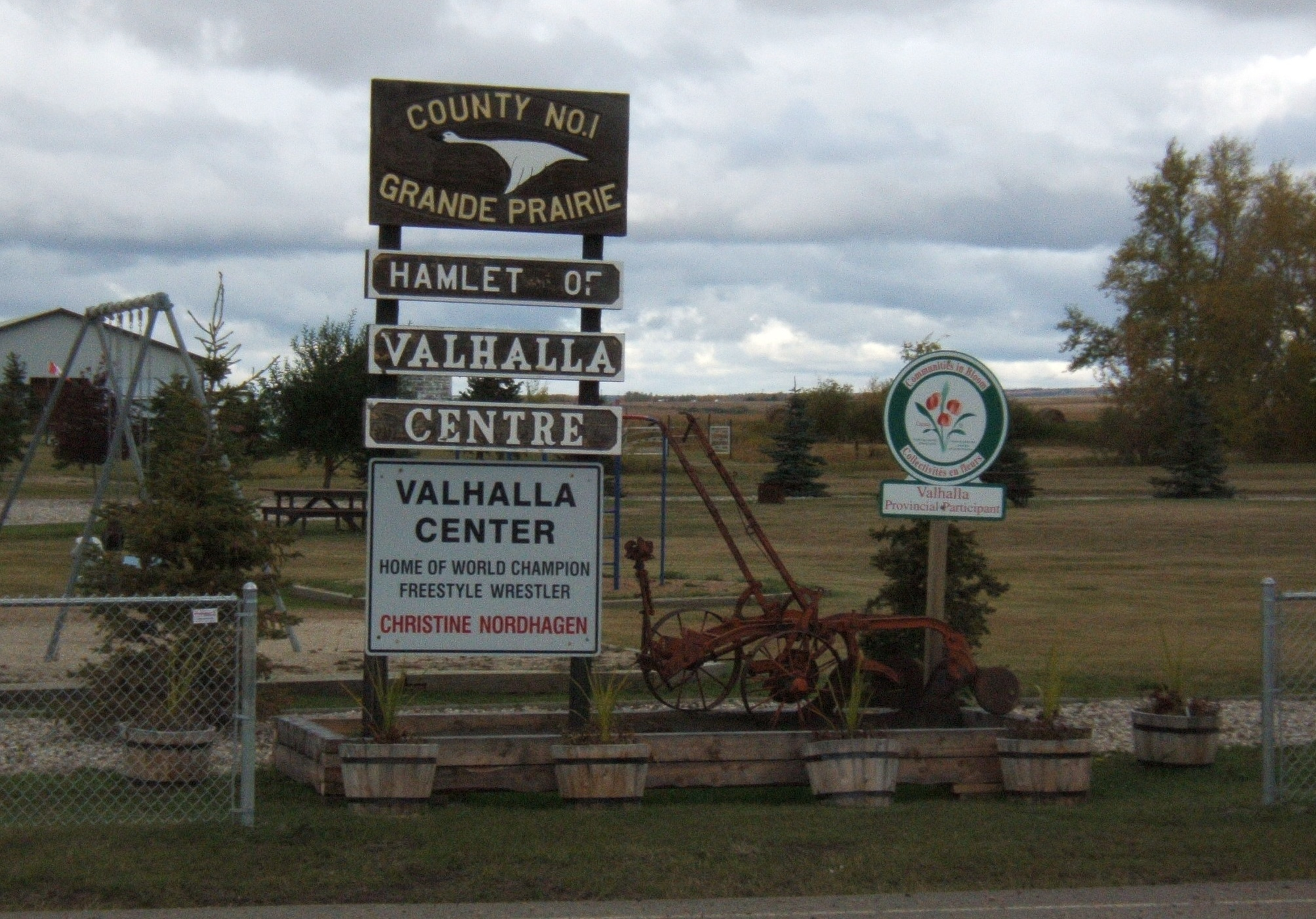 Skiltet som ønsker deg velkommen til Valhalla Center i Alberta, Canada